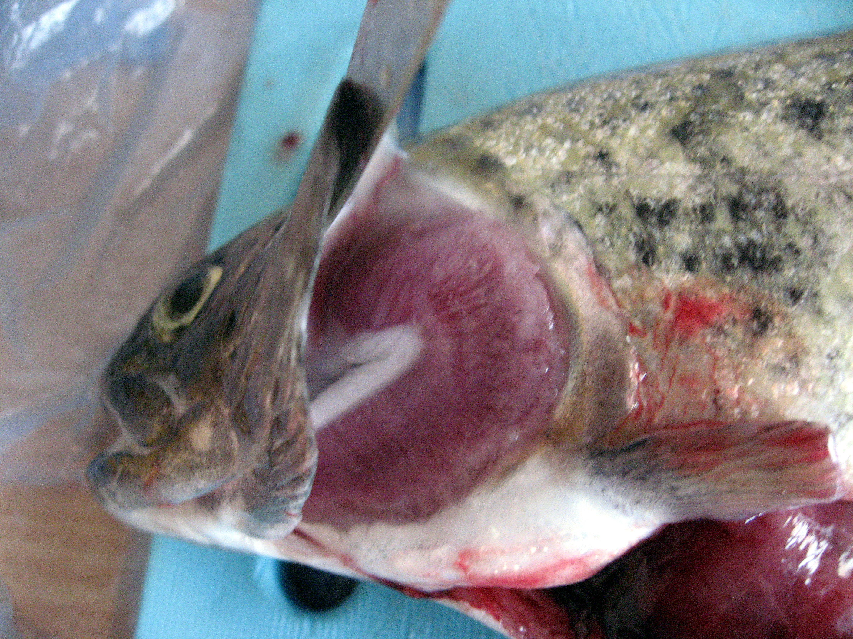 Pstruh duhový, žábryLatina: Oncorhynchus mykiss